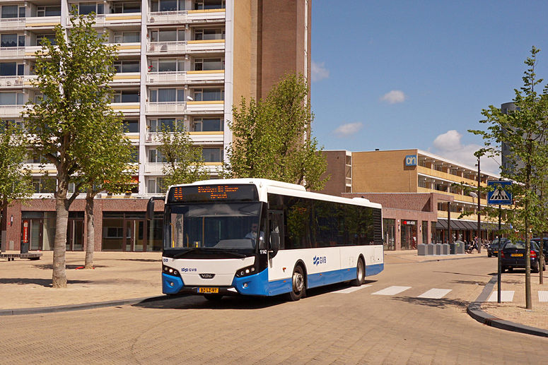 Lijn 44 op de Ouddiemerlaan in Diemen